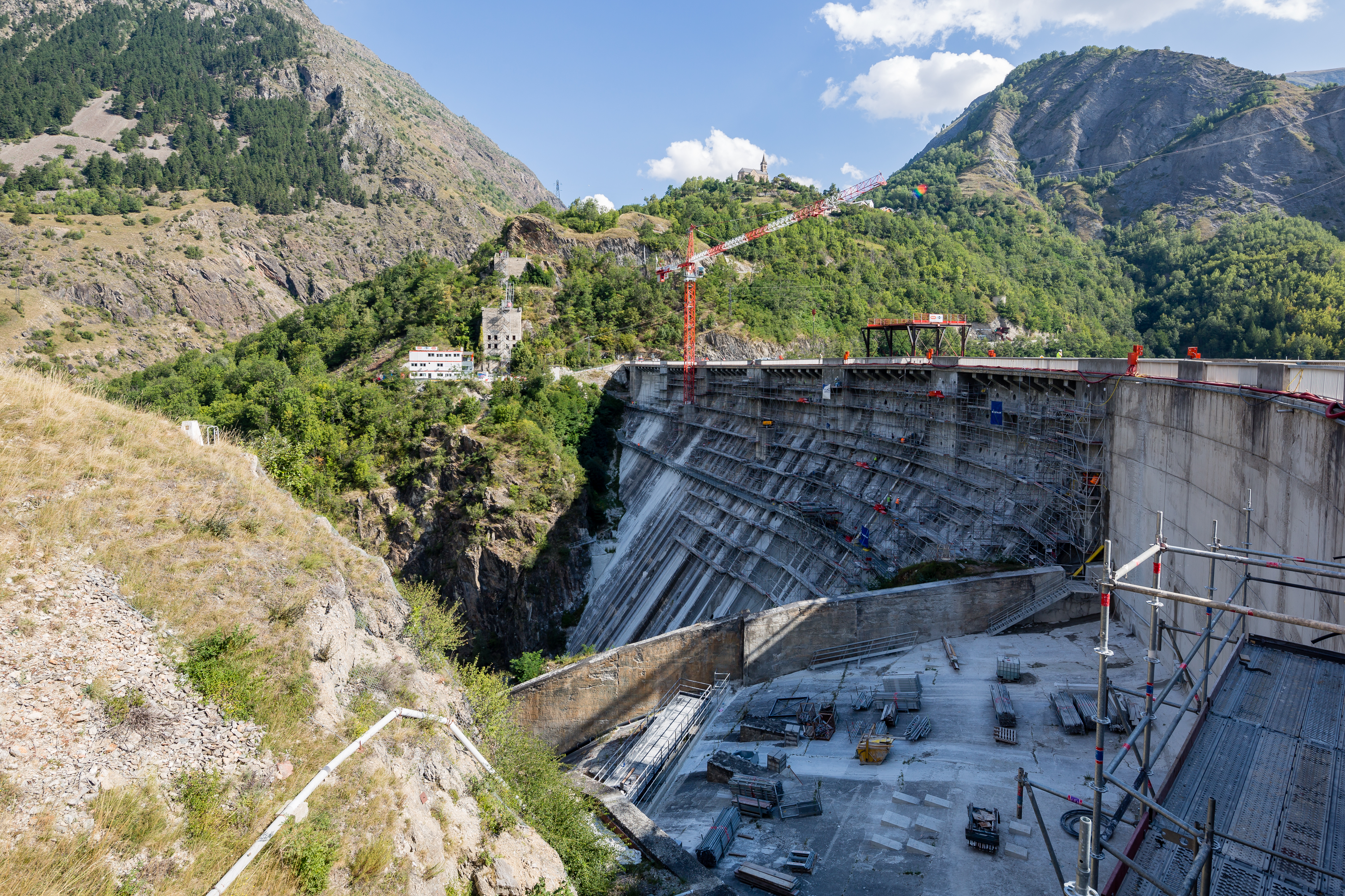 Le barrage du Chambon lors de travaux de confortement pendant l'été 2013.